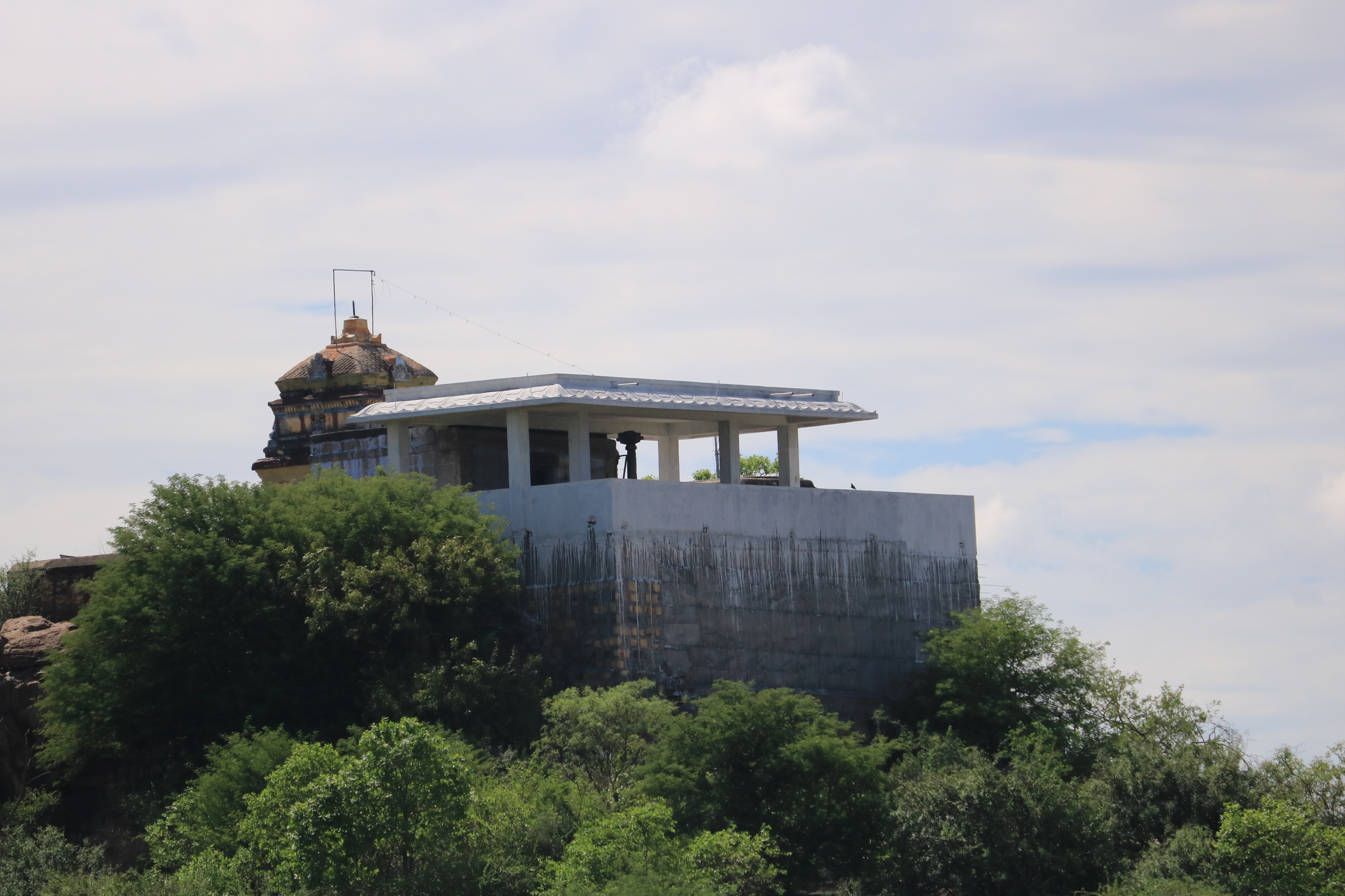 photo was taken By Balamurugan